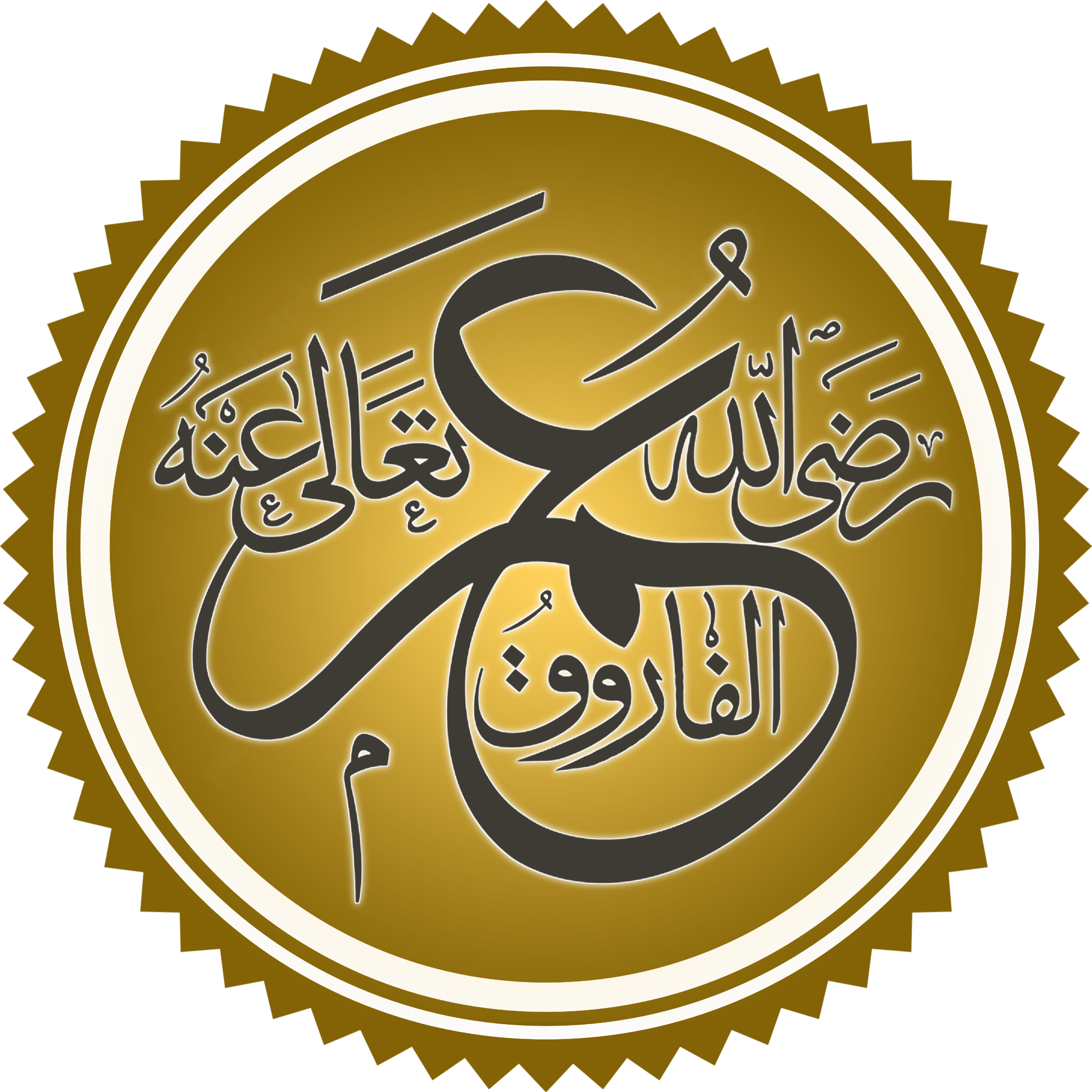 تخطيط اسم سيدنا عمر بن الخطاب رضي الله عنه